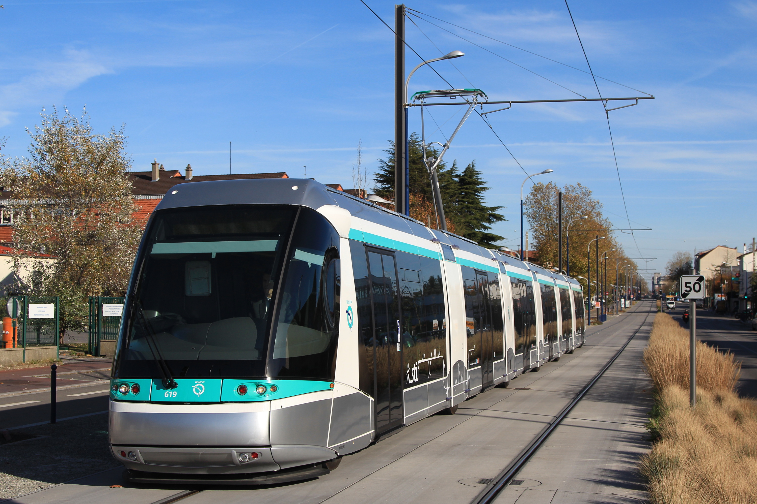 Un tramway Translohr de la ligne 6 à la station « Hôpital Béclère » lors d'essais avant ouverture de la ligne.